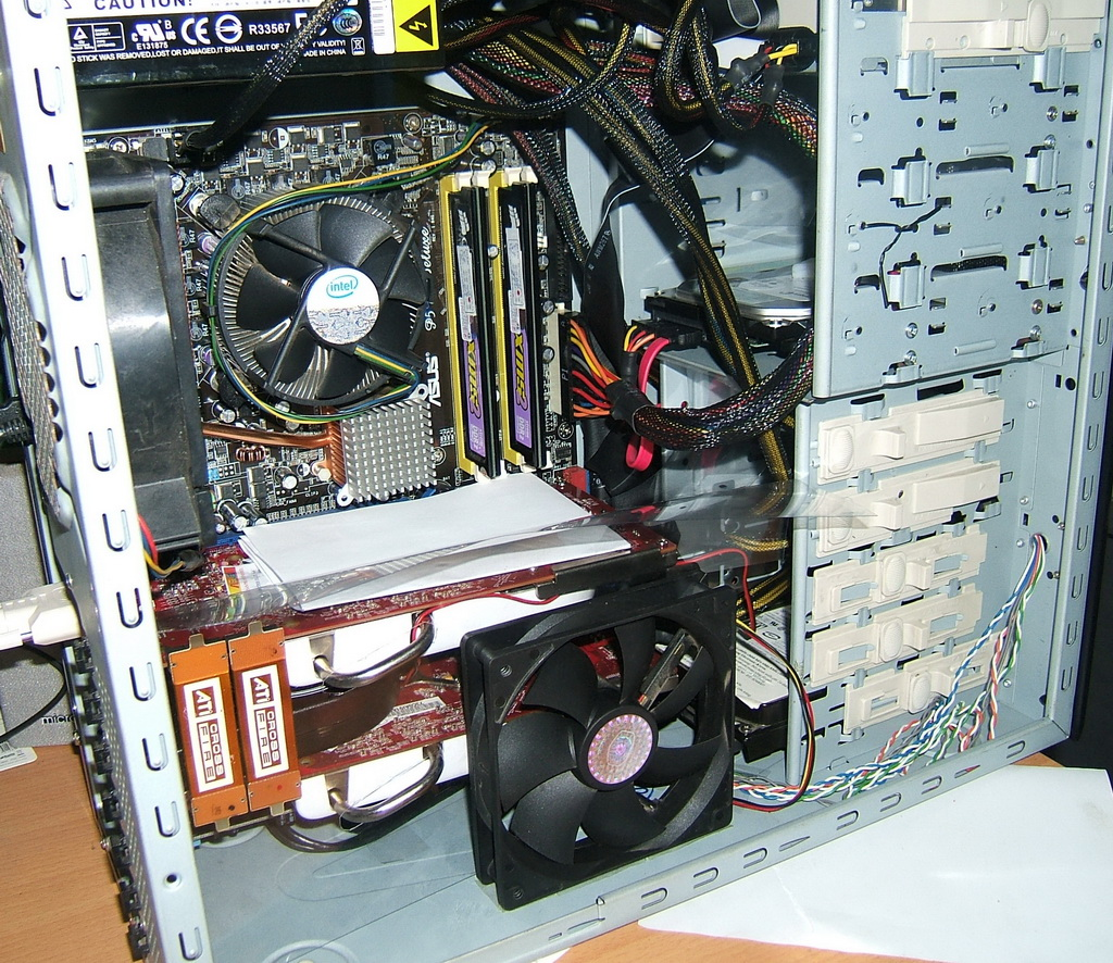 VGA ASUS EAX1950PRO Crossfire (x2)